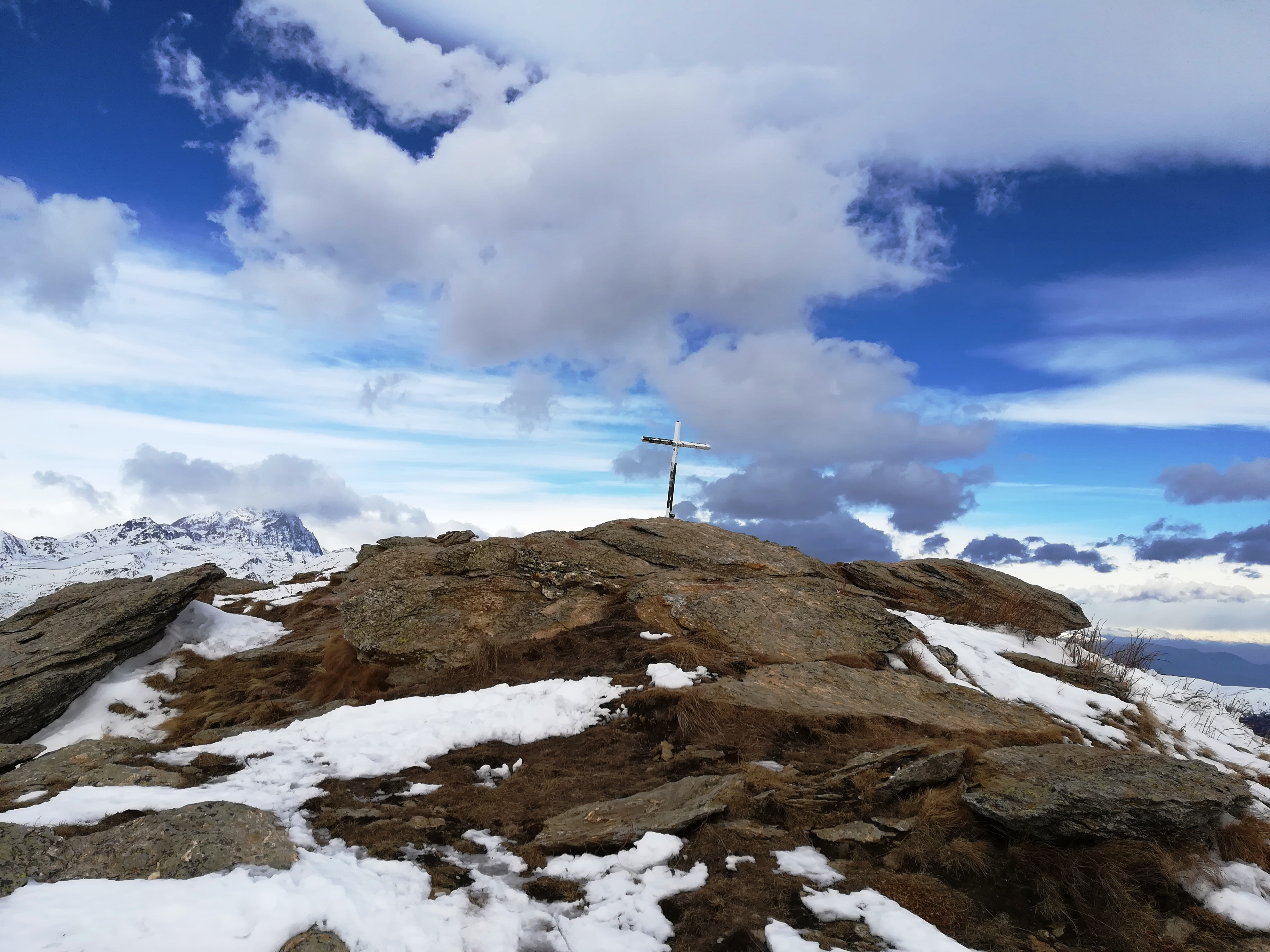 La vetta del monte Birrone tra la valle Varaita e la valle Grana nelle Alpi Cozie.